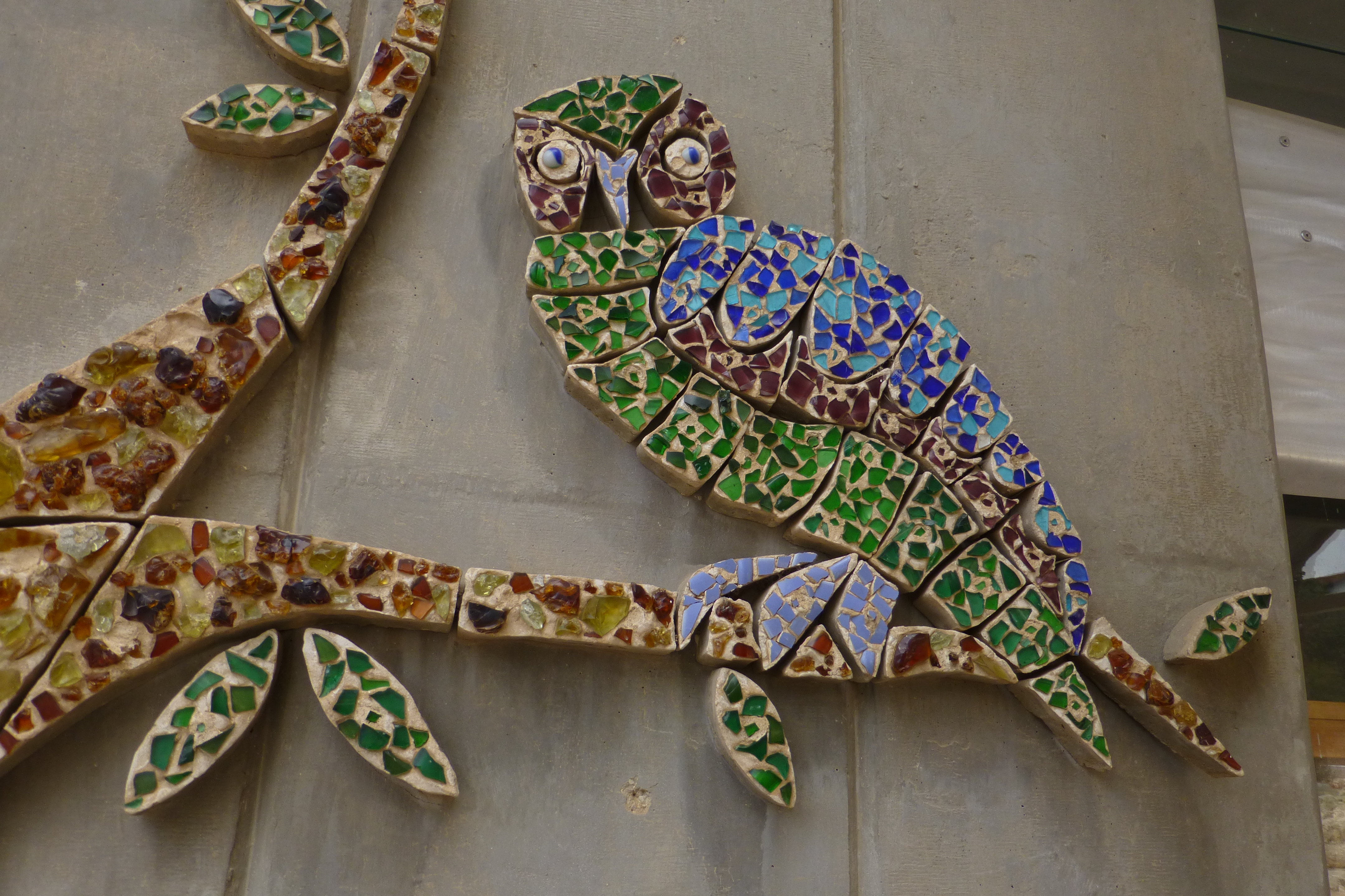 מוזיאון בית שטורמן המצוי בקיבוץ עין חרוד מאוחד נוסד בשנת 1941 על ידי חבר הקיבוץ שמואל סבוראי כמוזיאון לטבע.